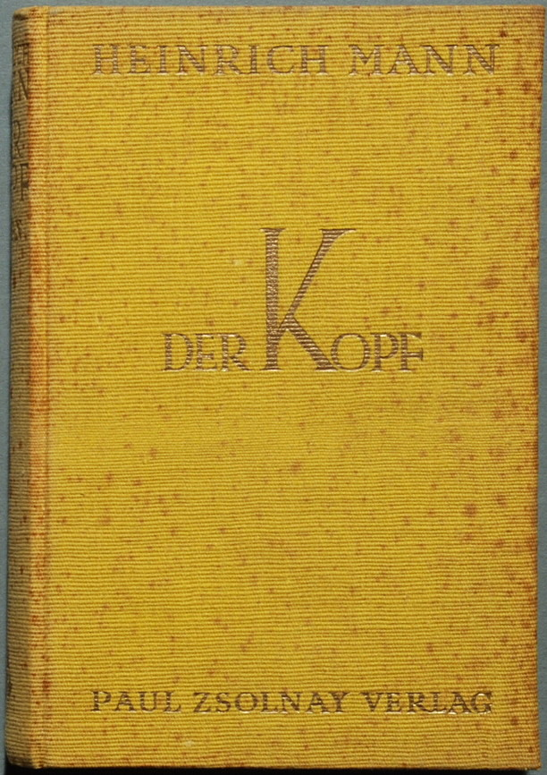 Mann,Heinrich: Der Kopf. Berlin Leipzig Wien: Zsolnay 1925, 636 Seiten. Original-Verlagseinband des Erstdrucks (Wilpert/Gühring² 50)